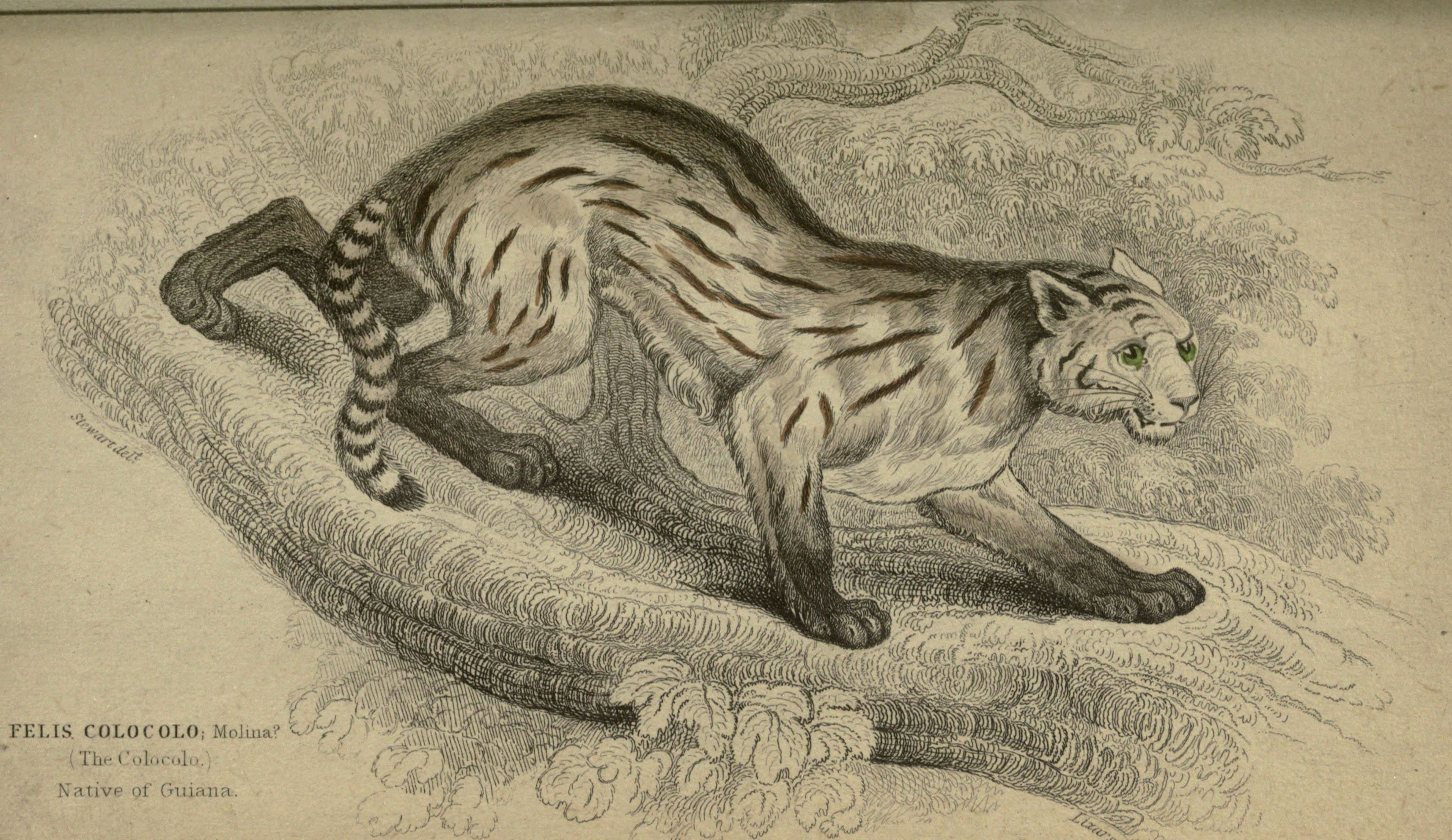 Lions, tigers, &c., &c